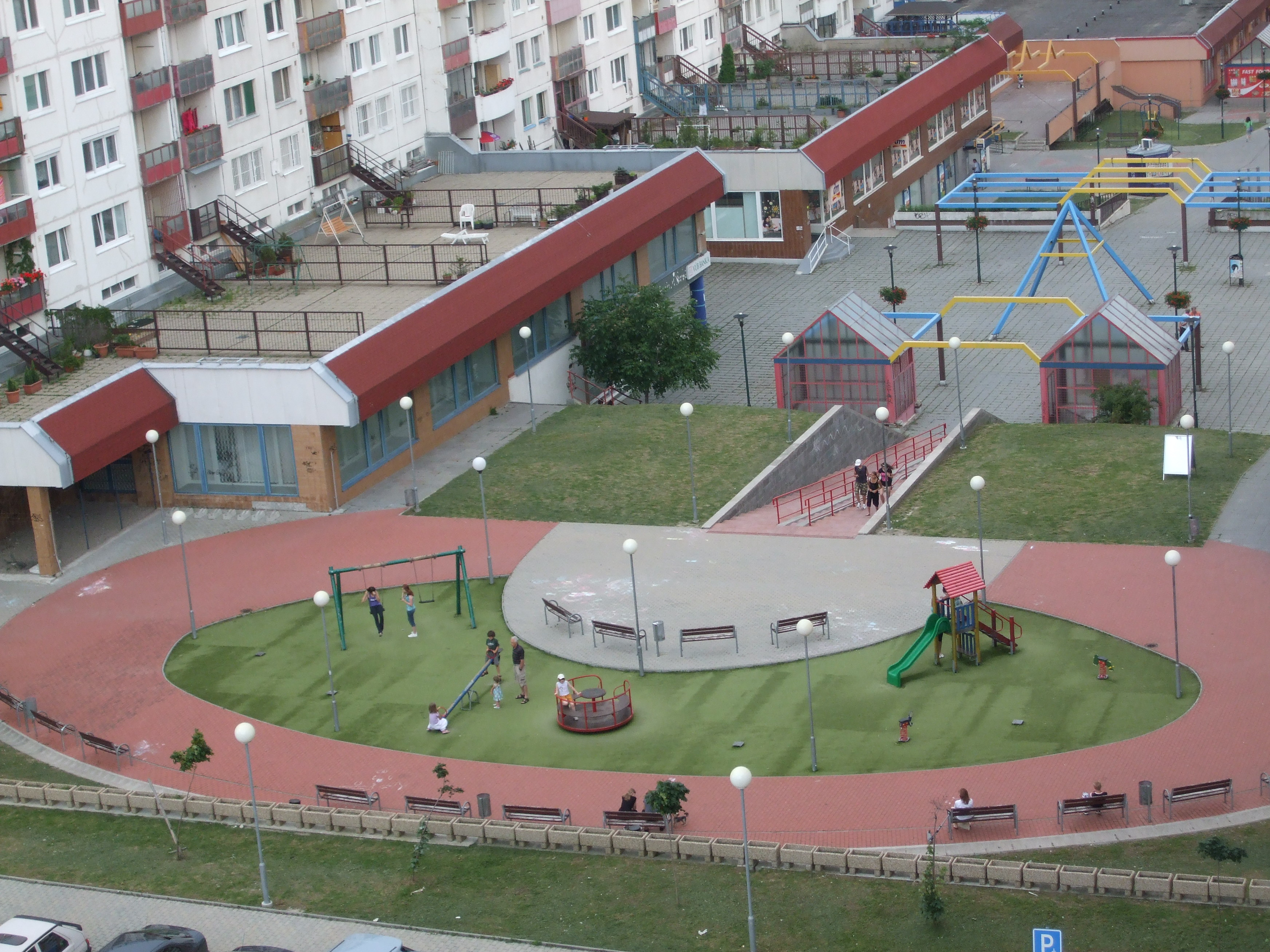 Fotografia mestskej časti Dlhé diely (Bratislava), na zábery je detské ihrisko a v pozadí možno vidieť kovové prvky slúžiace ako dekorácia.